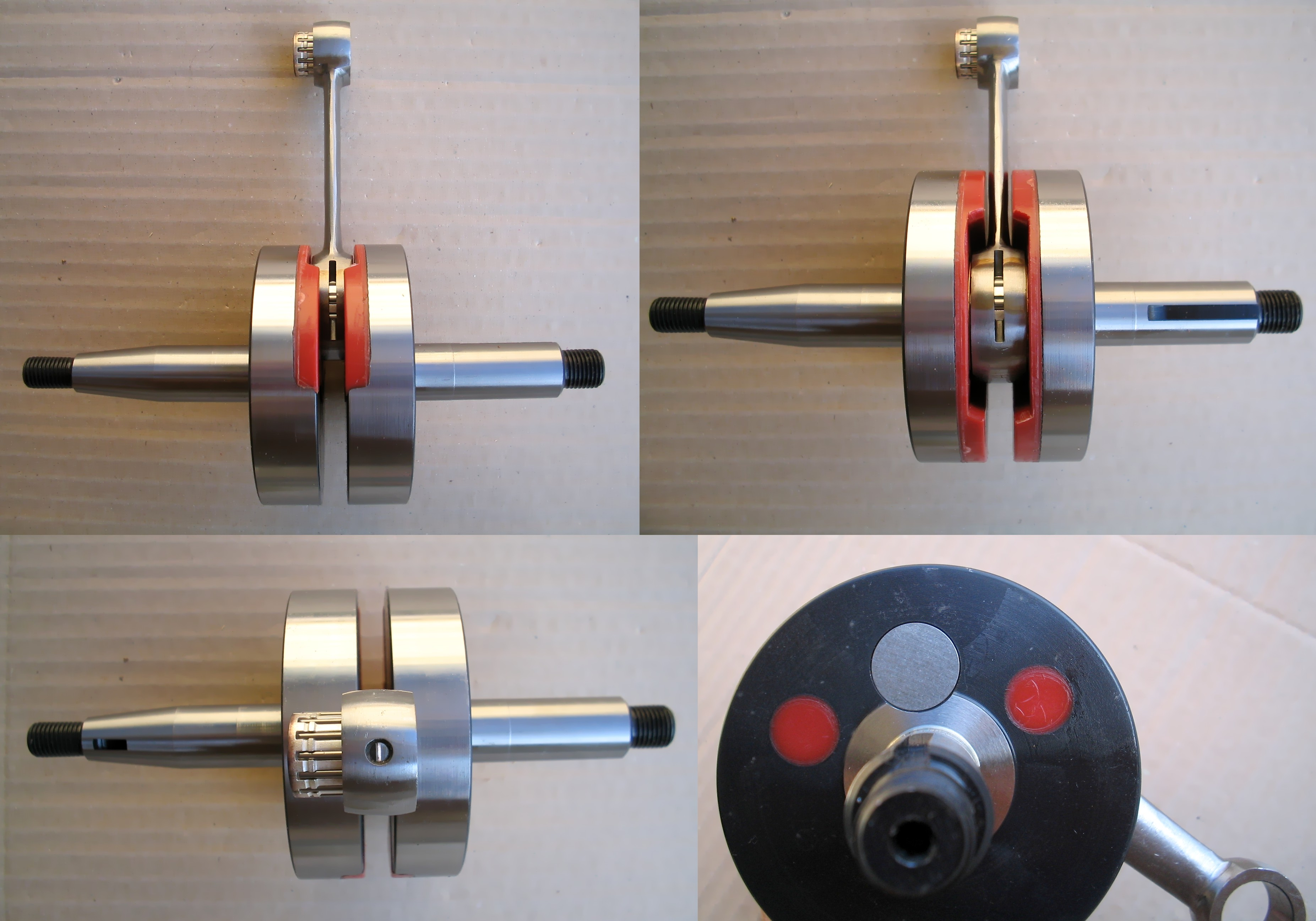 Albero motore Motoforce Minarelli AM, caratterizzato dalla biella lucidata, gabbietta a rulli argentata, e dagli inserti in teflon per ridurre i spazi nocivi.